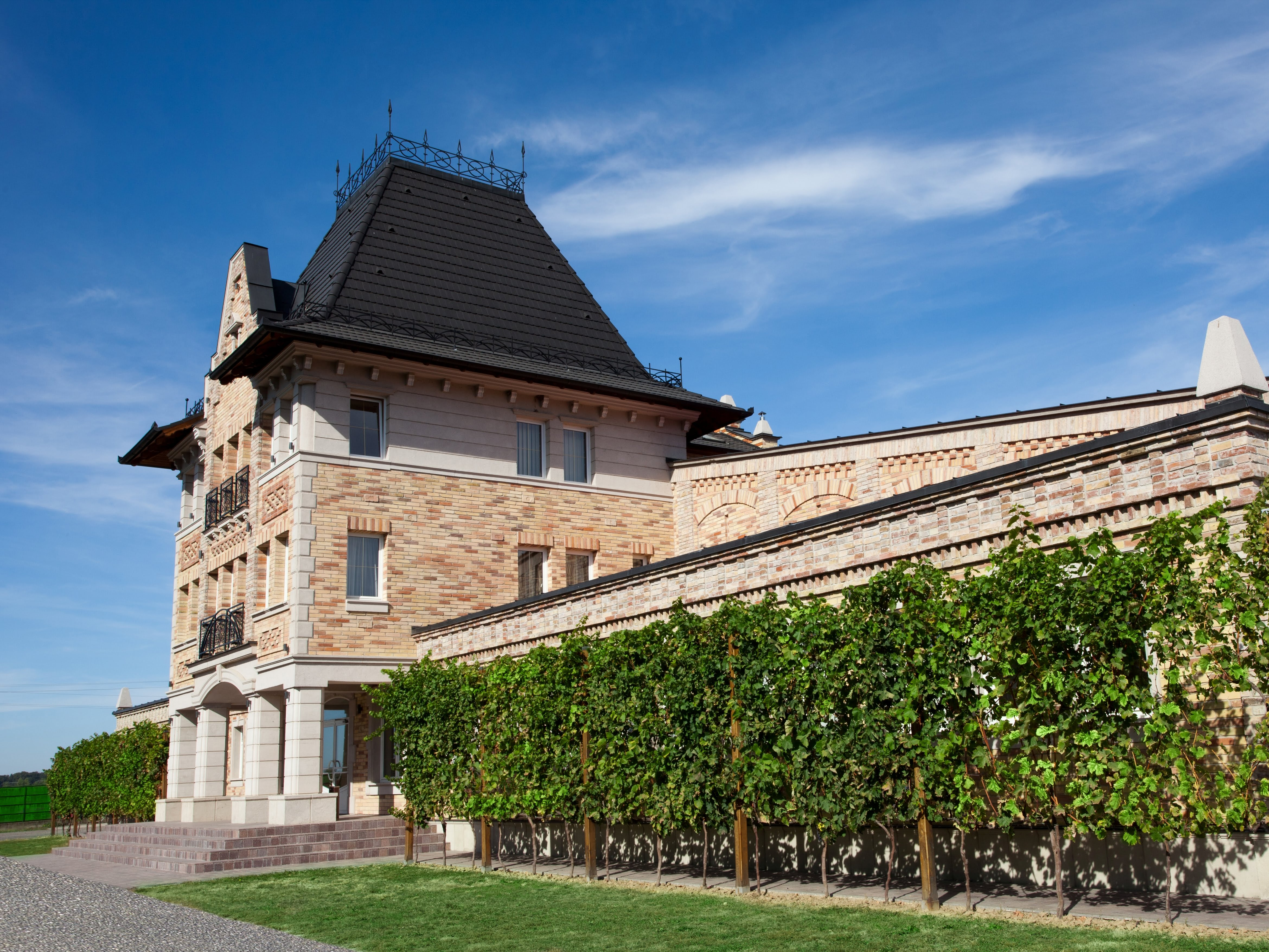 Будівля Шато Чизай (шато - маєток посеред виноградників)